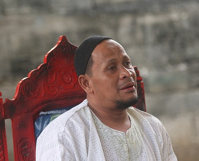 Sulu Sultan Muedzul Lail Tan Kiram